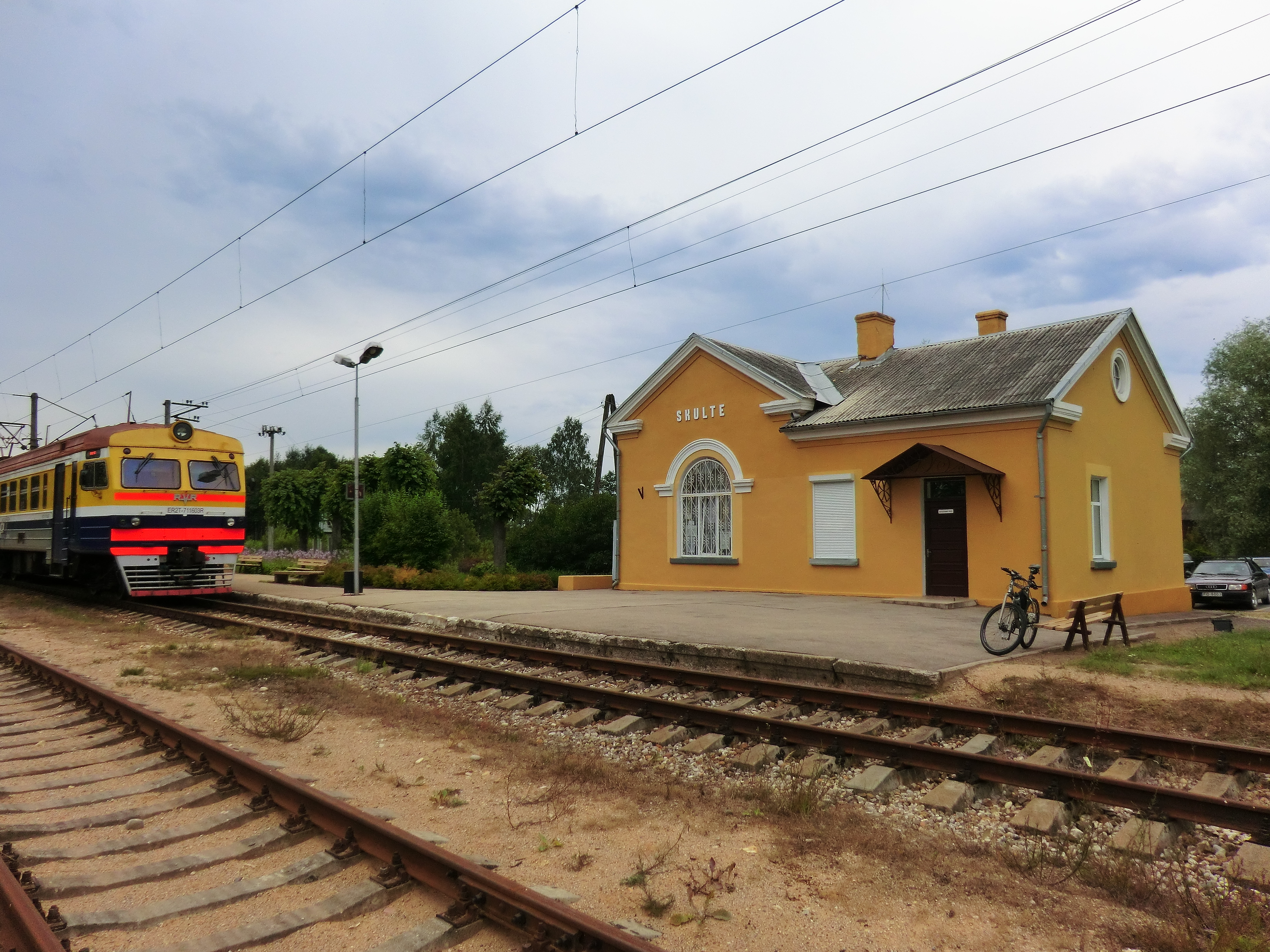 ст. Скулте (5)